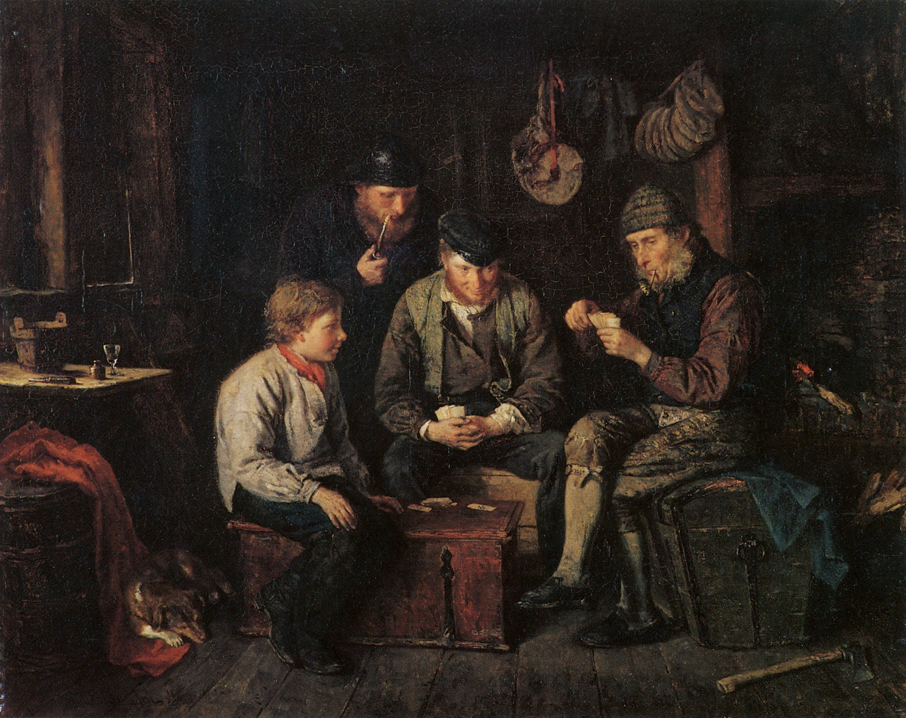 Finnish: Ahvenanmaalaisia Merimiehiä Pelaamassa korttia Kajuutassalabel QS:Lfi,"Ahvenanmaalaisia Merimiehiä Pelaamassa korttia Kajuutassa"